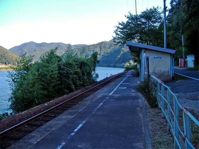 2007年10月 投稿者撮影